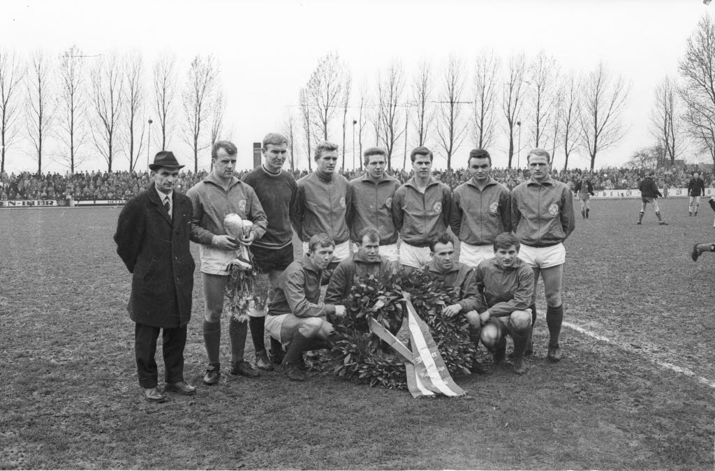 Offizielle Mannschaftsehrung im Holsteinstadion vor dem Spiel gegen Altona 93 in der Regionalliga Nord. Hintere Reihe v.l.n.r.: Trainer Helmut Ullmann, Günter Tams, Torwart Franz Möck, Jürgen Rohweder, Gerd Koll, Otto Hartz, Gerd Saborowski und Werner Bähnck. Vordere Reihe v.l.n.r.: Manfred Podlich, Jürgen Harm, Rudi Balsam, Josef Pistauer.